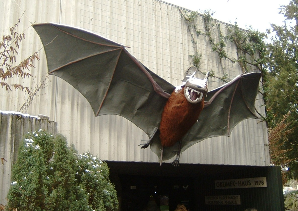 Eingang zum Grzimek-Haus, Nachthaus im Zoo Frankfurt